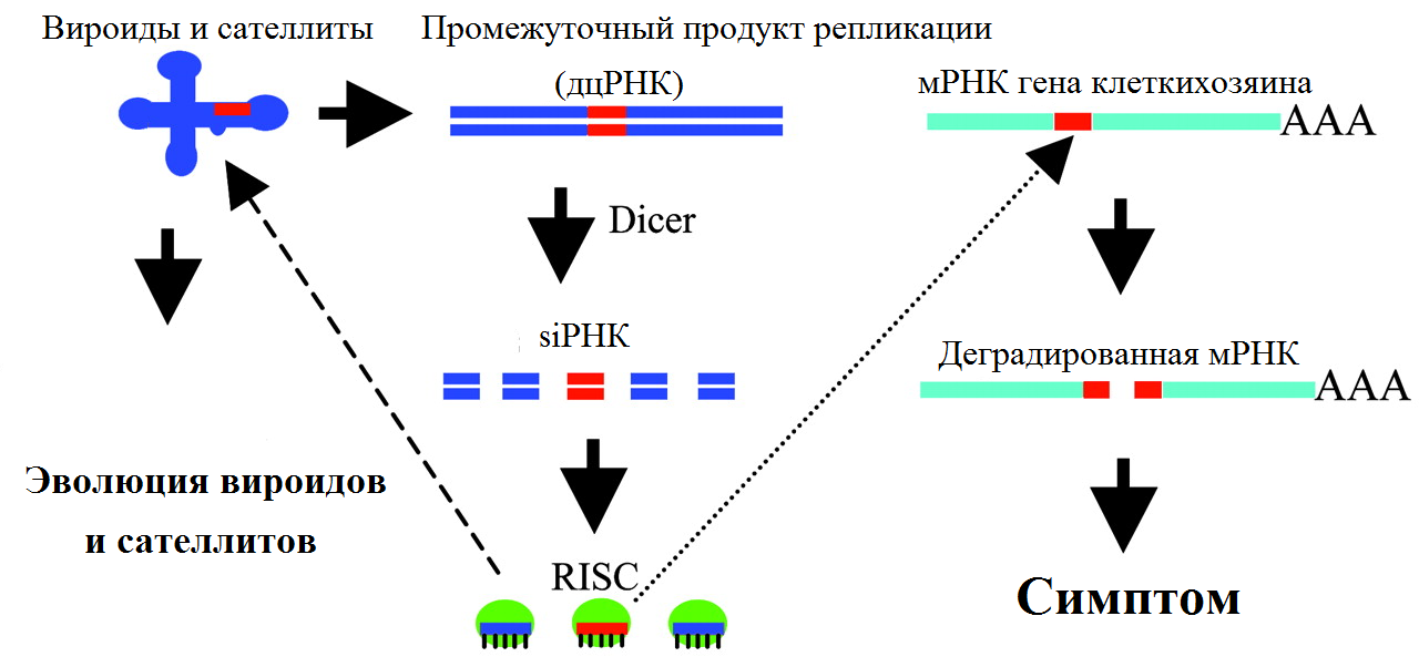 Вироиды